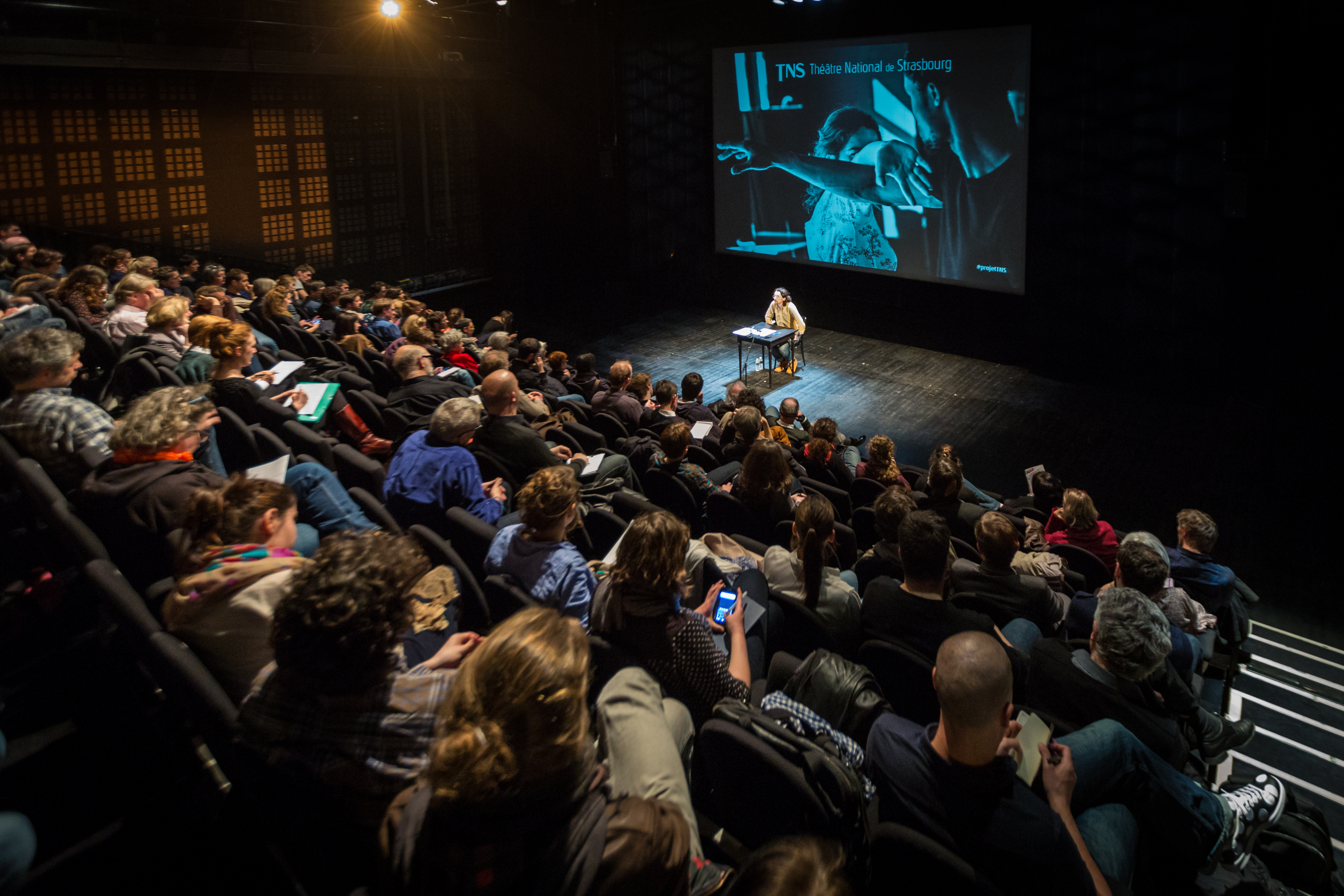 Stanislas Nordey présente son programme au Théâtre National de Strasbourg le 24 mars 2015.